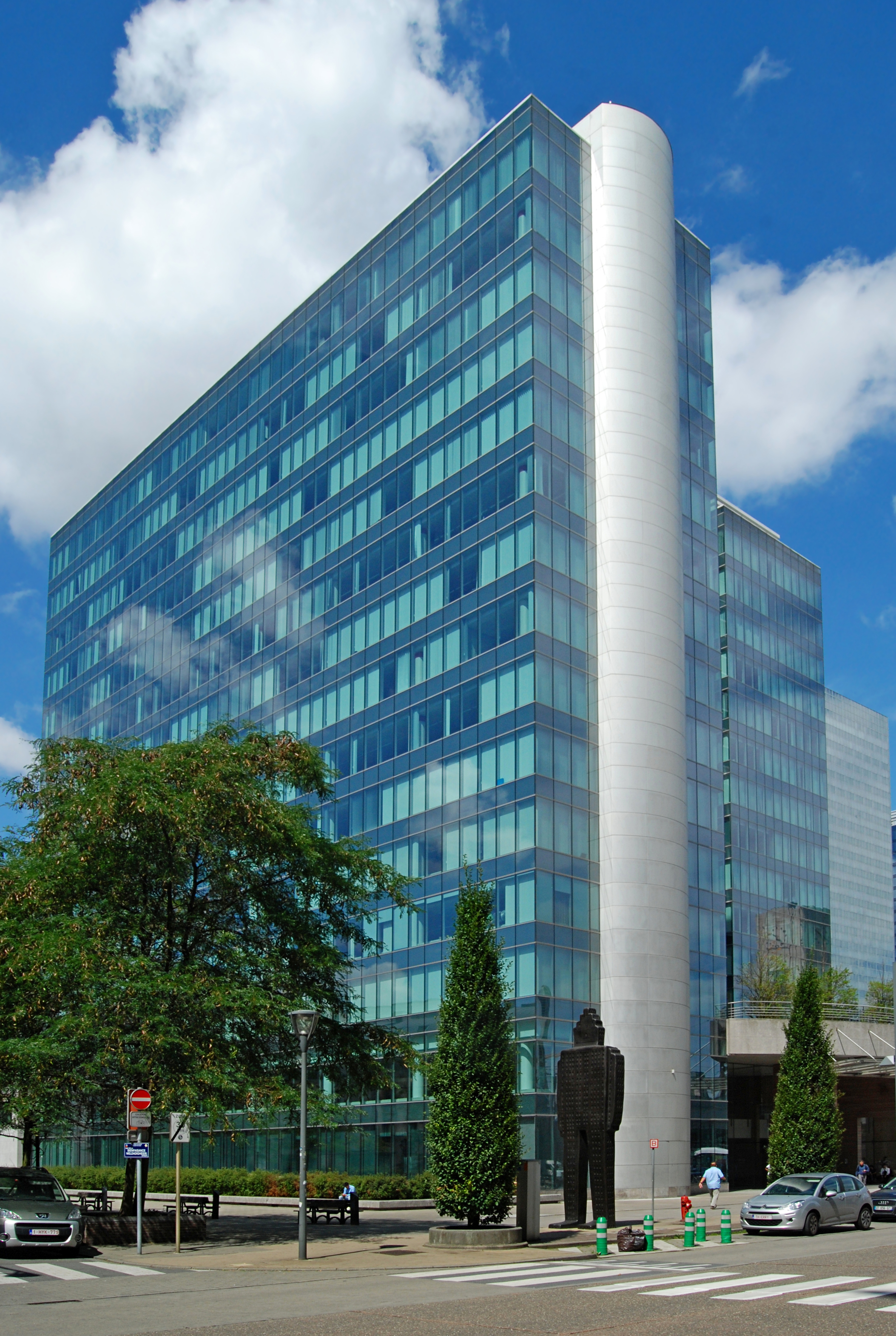 Belgique - Bruxelles - Boreal building (Postmodernisme, architecte Michel Jaspers, 2001) : statue La ville en marche de Jean-Michel Folon au pied du Boreal (rue du Progrès)